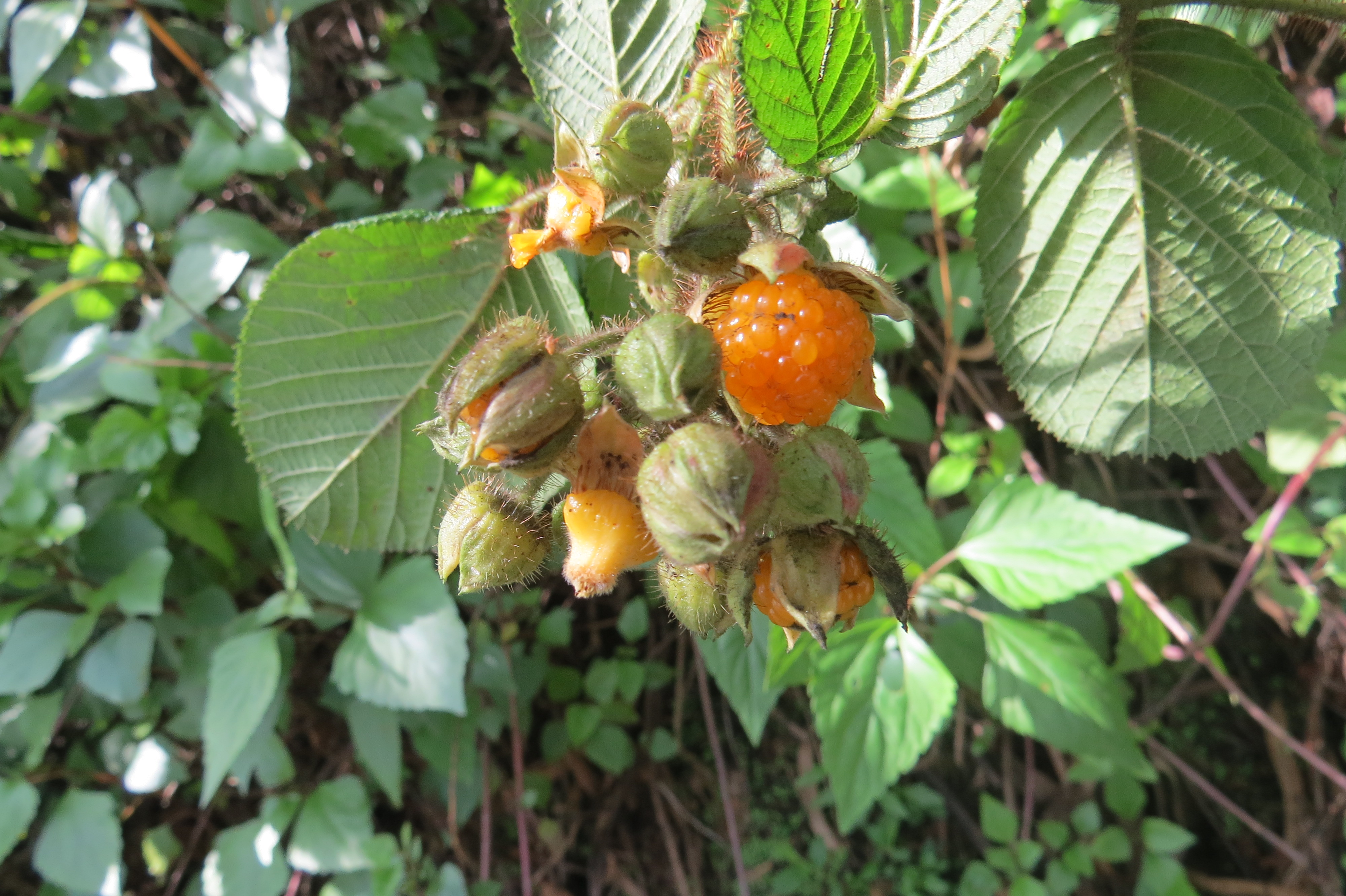 Photos by Vinayaraj